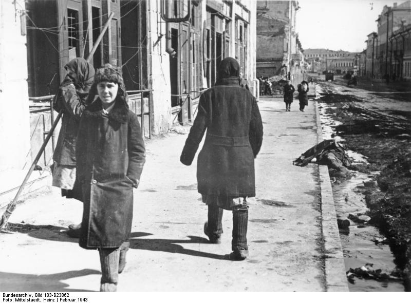 Scherl: Wiedererwachen des zivilen Lebens in Charkow. Noch zeigen die Straßen der Stadt die Spuren der erbitterten Kämpfe, aber schon tauchen die ersten Zivilisten auf. PK-Aufnahme: Kriegsberichter Mittelstaedt 3.3.43 [Herausgabedatum]